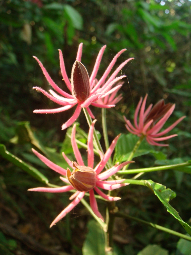 Uma quinta flower power pra vc!!! A foto foi tirada no caminho para o covento da Penha-ES